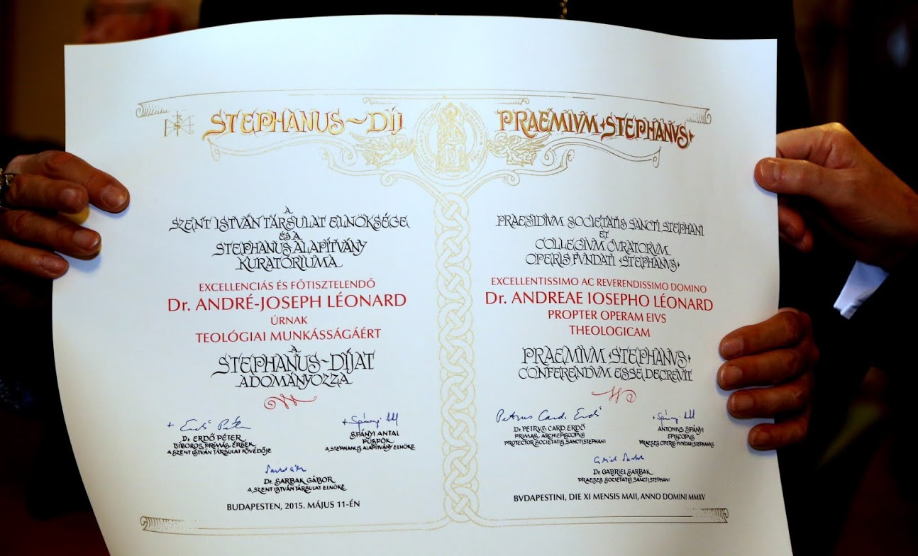 Stephanus-díj oklevele